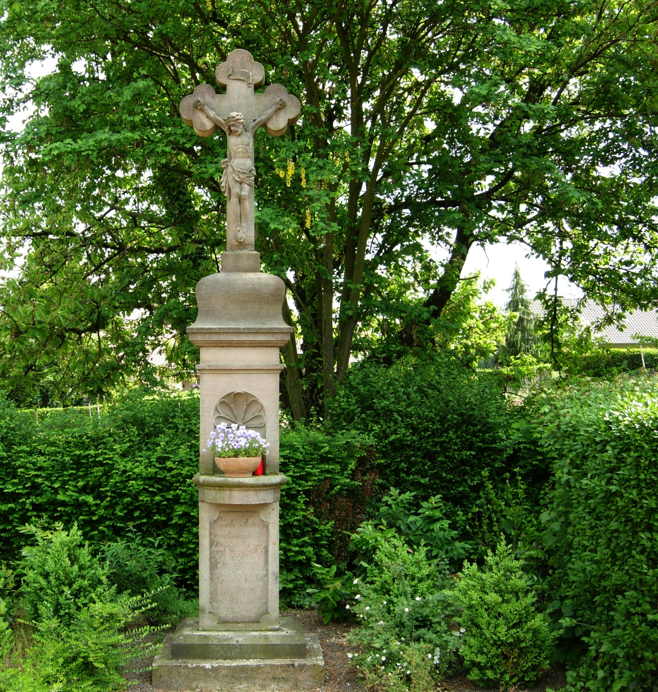 Votivkreuz auf dem Friedhof in Bornheim-Waldorf. Die Inschrift unter der Konsole lautet: Erecta A[nno] 1842 ex votis conj[ugum] Mathiae Schmidt et Agn[ae] Schneider eorumque filii pl[acidi?] Rudi [Rudolfi?] Jac[obi] Schmidt hic loci ab A[nnis] 1824 – 1837 Pastoris (Errichtet im Jahre 1842 auf Grund von Gelübten der Eheleute Mathias Schmidt und Agnes Schneider sowie ihres lieben (?) Sohns Rudolf Jakob Schmidt, des hiesigen Pfarrers in den Jahren von 1824 bis 1837).